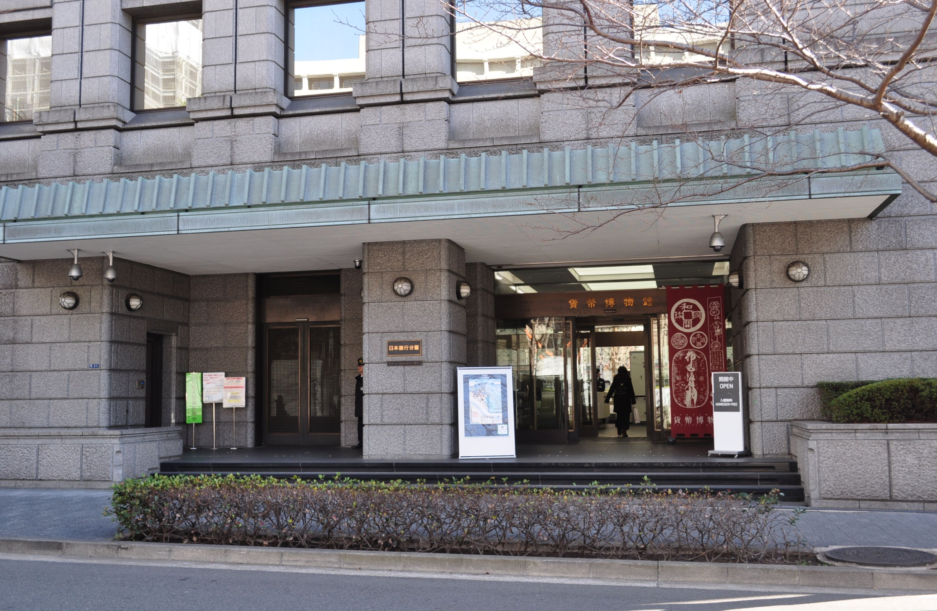 の本銀行貨幣博物館